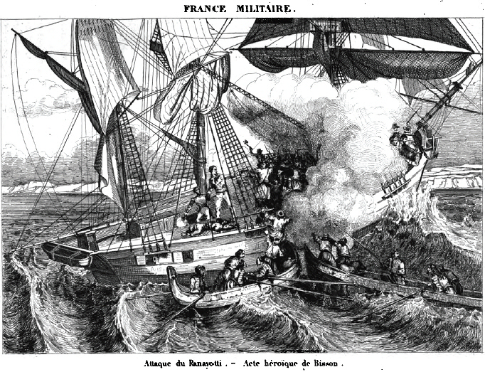 Gravure ancienne. "Attaque du Payanotti, acte héroique de Bisson". A propos du sacrifice de Hippolyte Magloire Bisson en 1827 durant la guerre d'indépendance grecque.